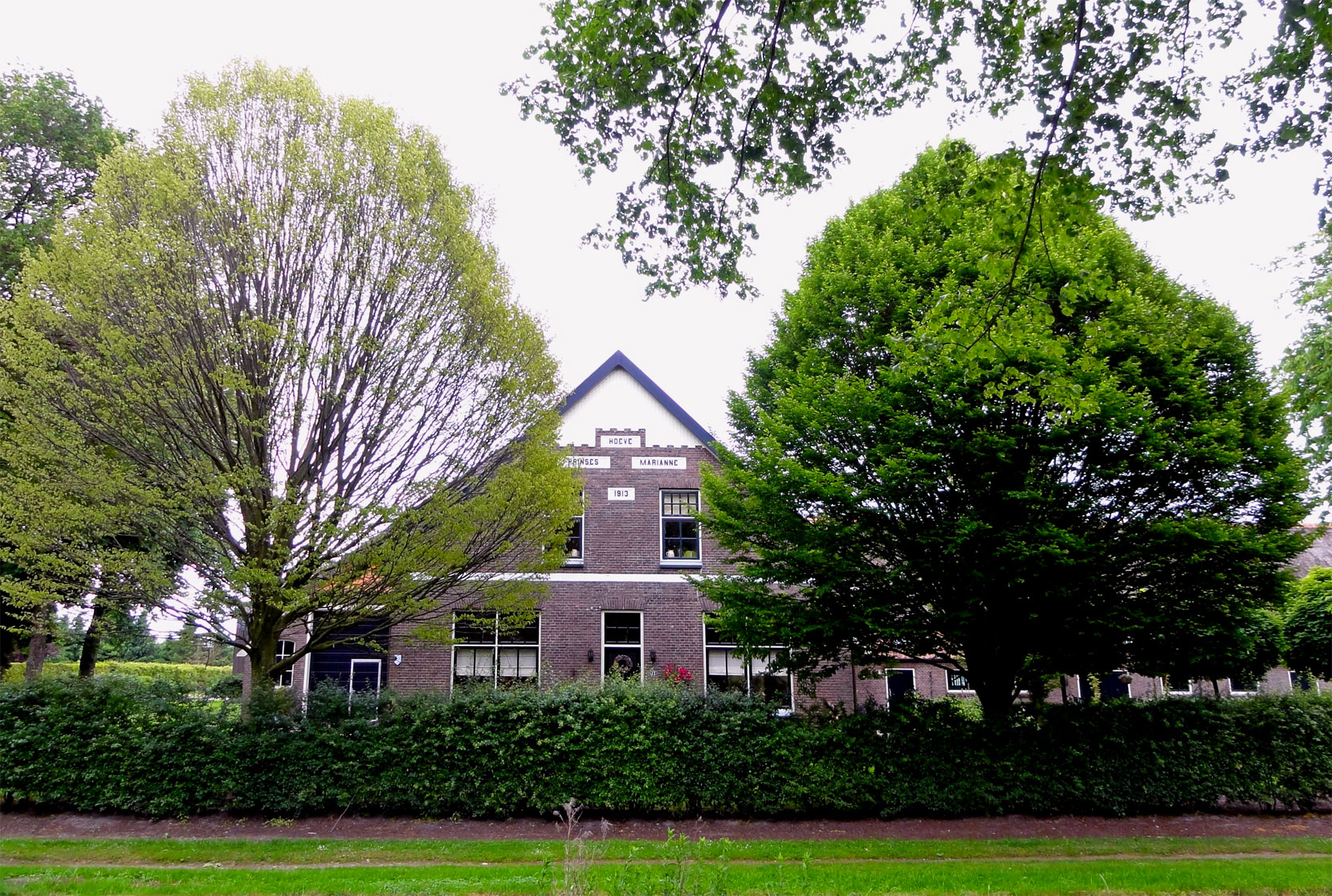 Hoeve Prinses Marianne van de Maatschappij van Weldadigheid - Koningin Wilhelminalaan 33 Wilhelminaoord - rijksmonument